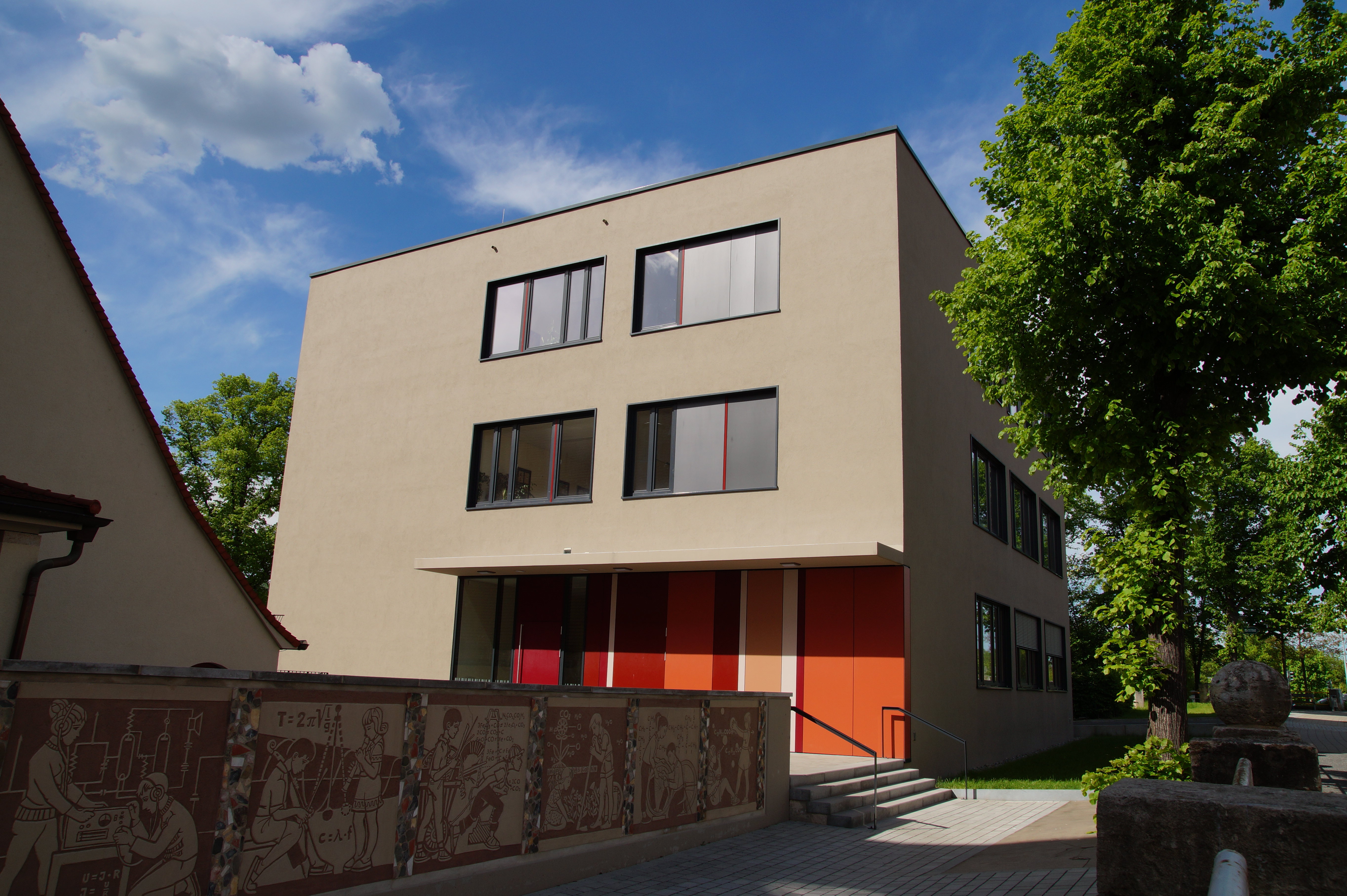 2011 fertiggestellter Anbau des Angergymnasiums (Ostschule) in Jena